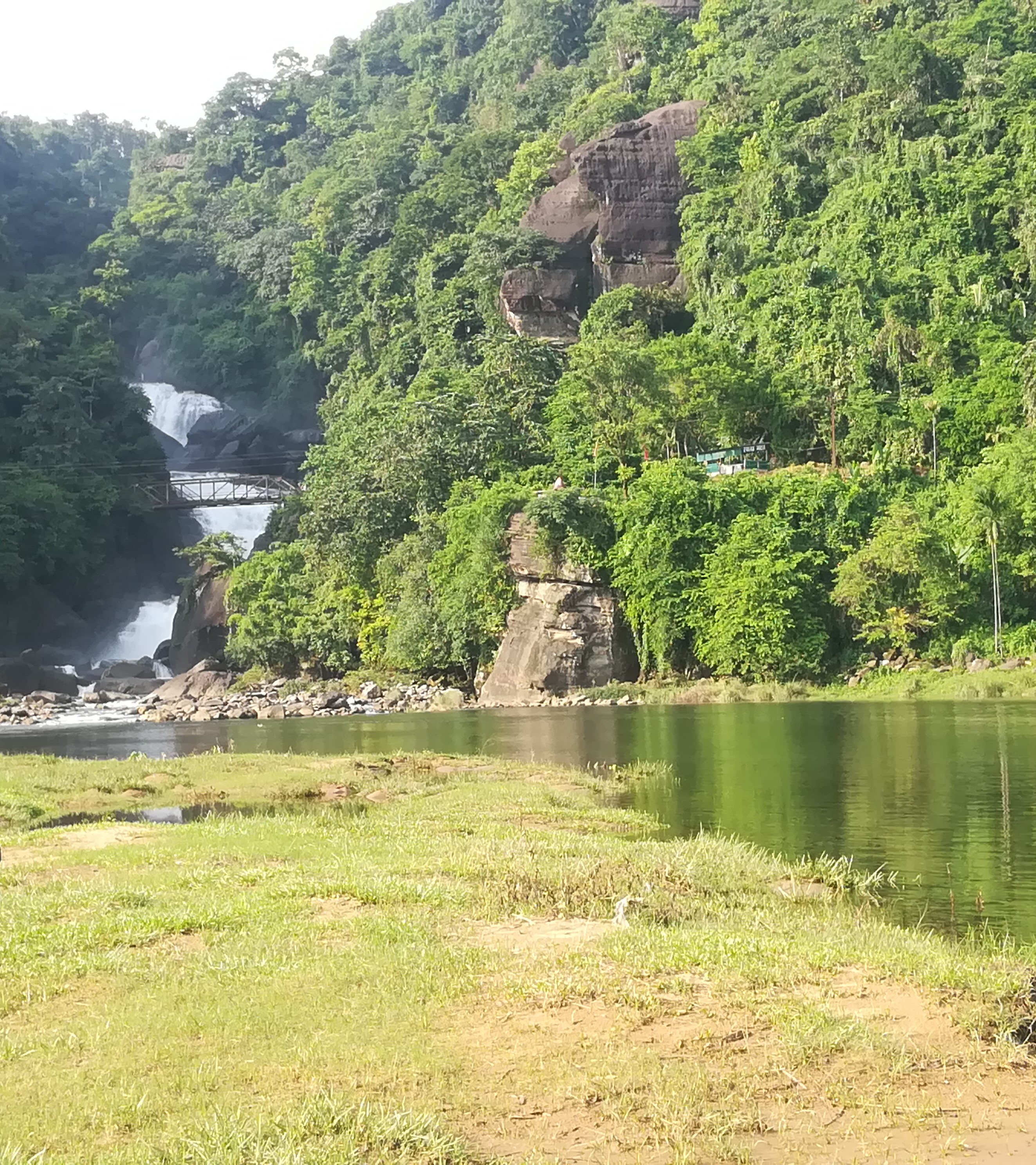 ছবি পান্থুমাই ঝর্ণা